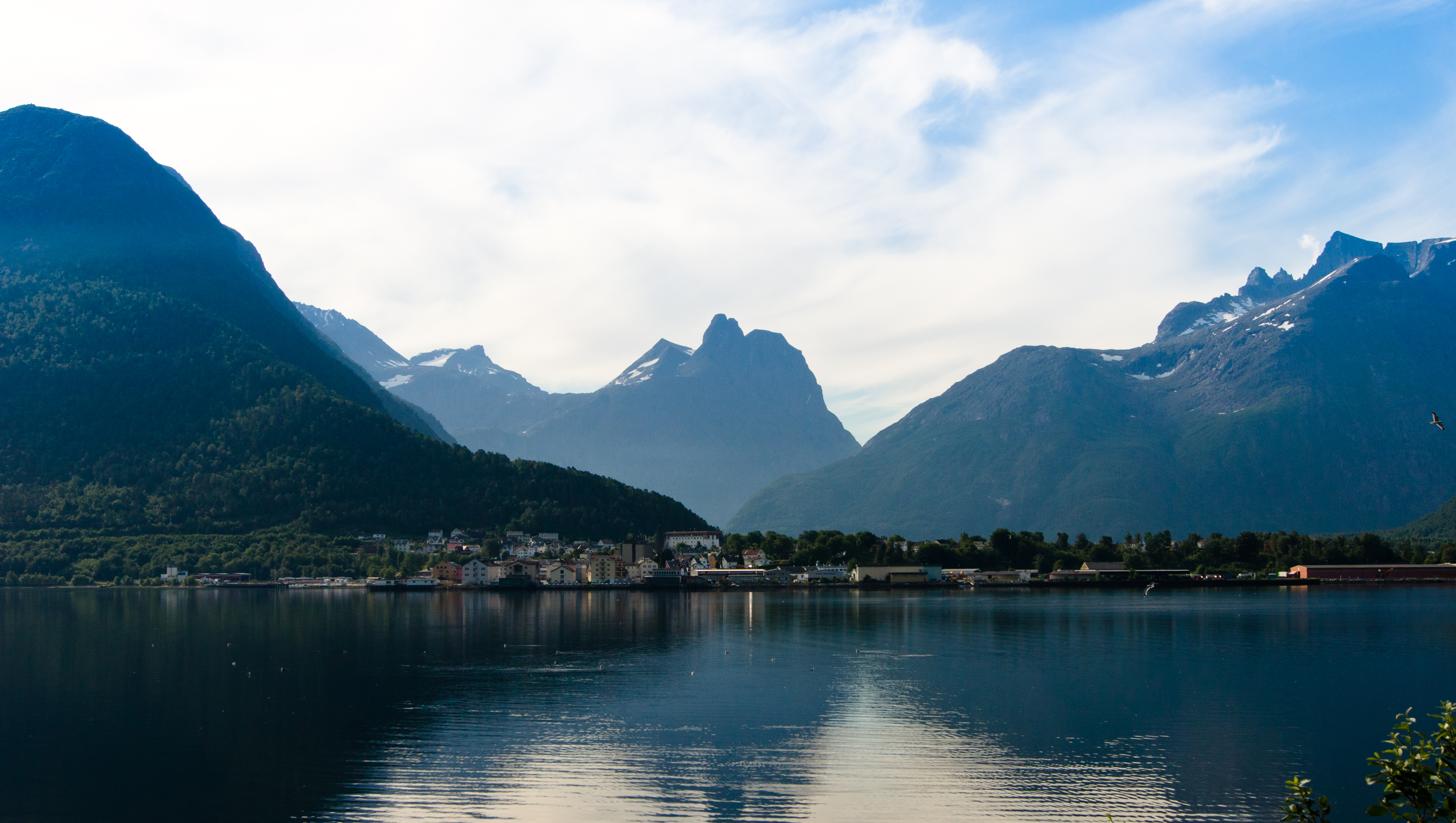 Åndalsnes, Norvège.